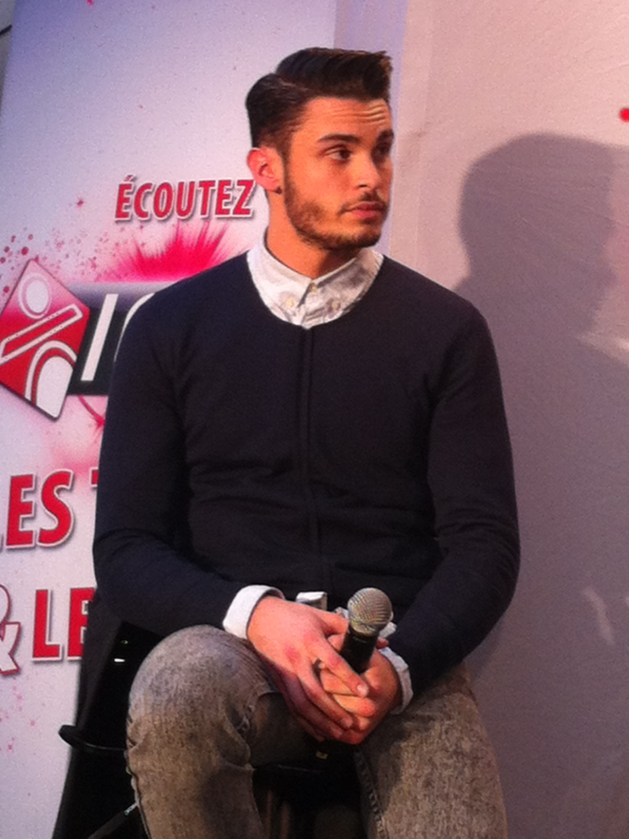 Bapstiste Giabiconi